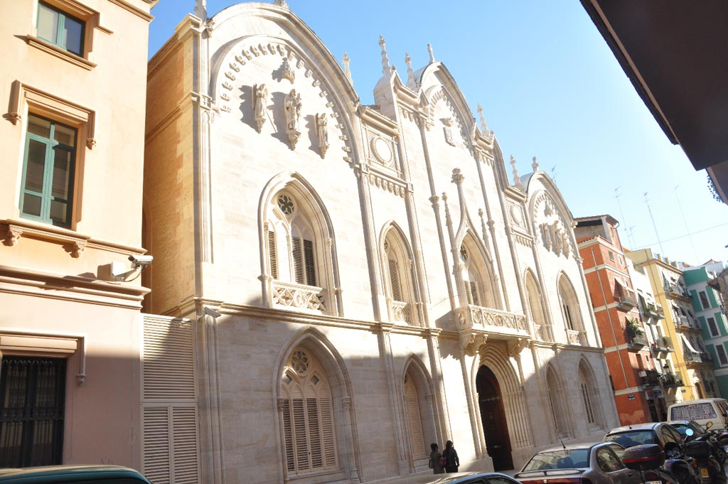 Fachada de la sede Marques de Campo